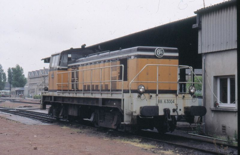 Une BB 63000 à St Pierre des Corps en juin 1998. Collection F.HALLIER .